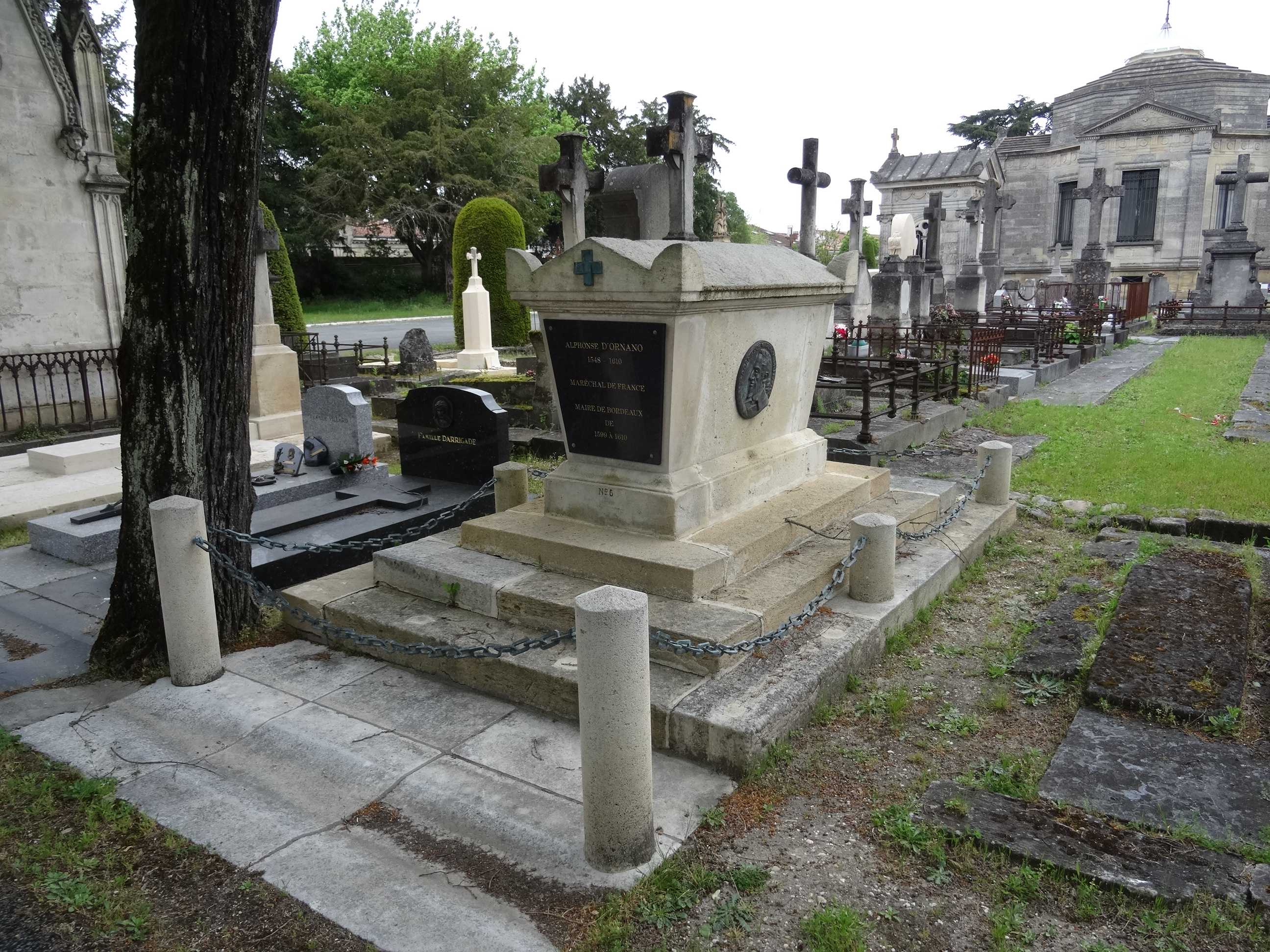 À Bordeaux, cimetière de la chartreuse.